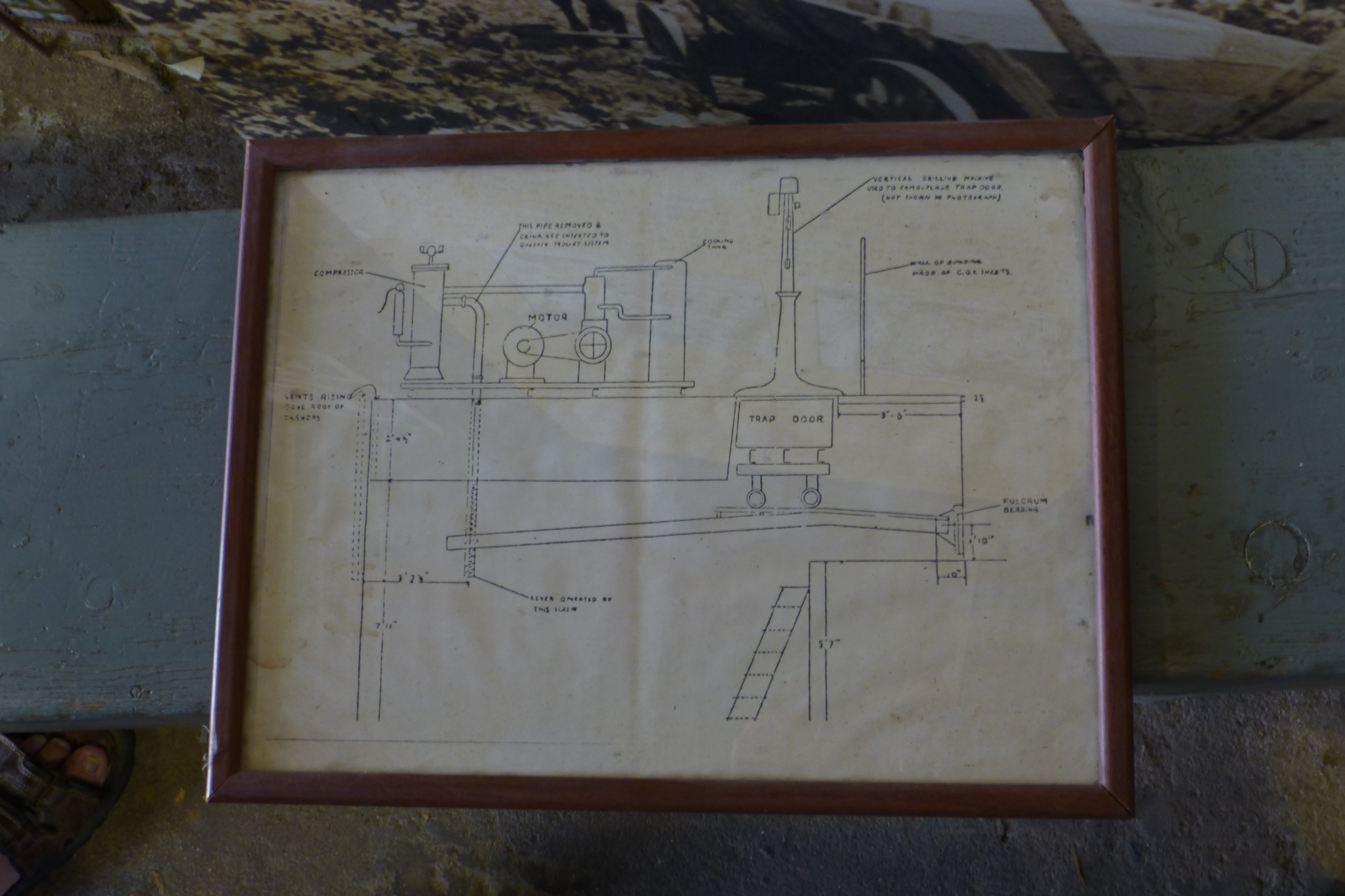 הסליק בקיבוץ יגור, סליק ארצי - נבנה בשנים 1937 - 1938. זה היה הסליק המרכזי בצפון הארץ. הסליק התפרסם כשנתגלה בעת חיפוש שנערך בקיבוץ בזמן השבת השחורה ב-29 ביוני 1946. הבריטים חפשו במשך מספר ימים בעזרת כלבים ומגלי מתכות ולבסוף גילו את הסליק המרכזי ועוד 25 סליקים קטנים. הנשק שהיה בסליקים הוחרם וחלק מחברי הקיבוץ נאסרו. זה היה אחד הסליקים הגדולים שבו נתפסו כ- 80 מרגמות 52 מ"מ, עשרות רובים תת-מקלעים ותחמושת רבה. הסליק המרכזי שנותר ריק לחלוטין מאז השבת השחורה, שוחזר ושופץ בשנת 1983 במסגרת חגיגות ה- 60 לקיבוץ.